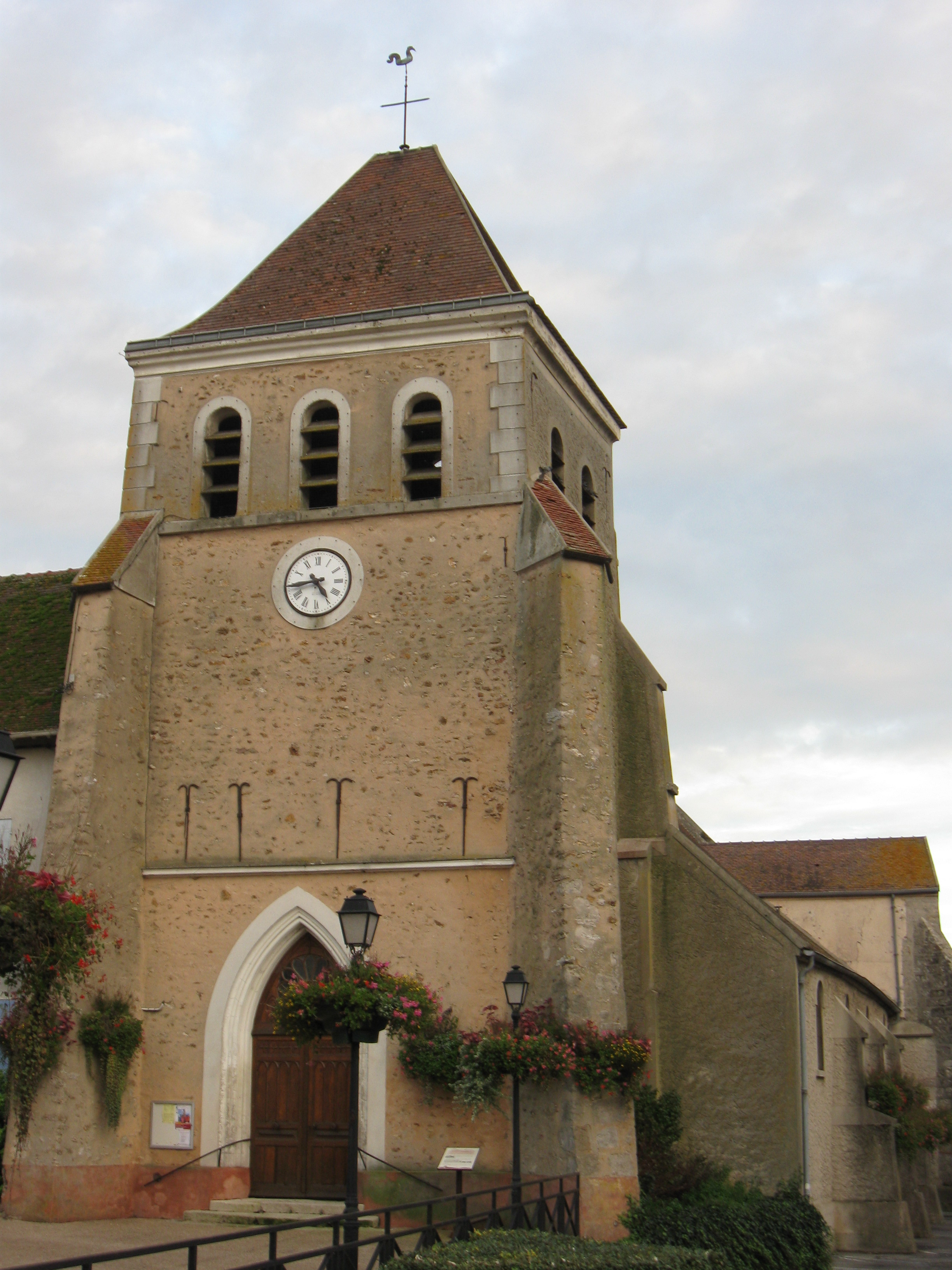 Église Saint-Rémi de Mouroux (département de la Seine-et-Marne, région Île-de-France).